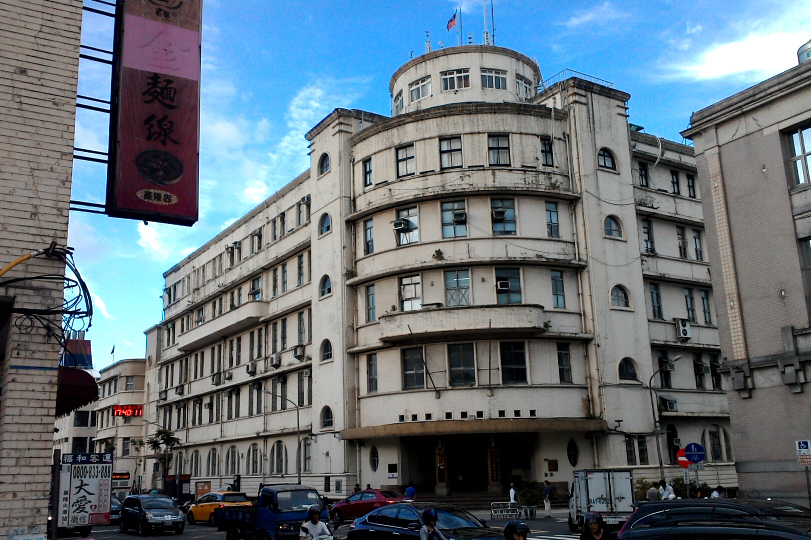 基隆港合同廳舍，基隆市仁愛區文昌里